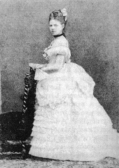 Мария Дмитриевна Багратион-Мухранская, ур. Головачева (1855—1932)